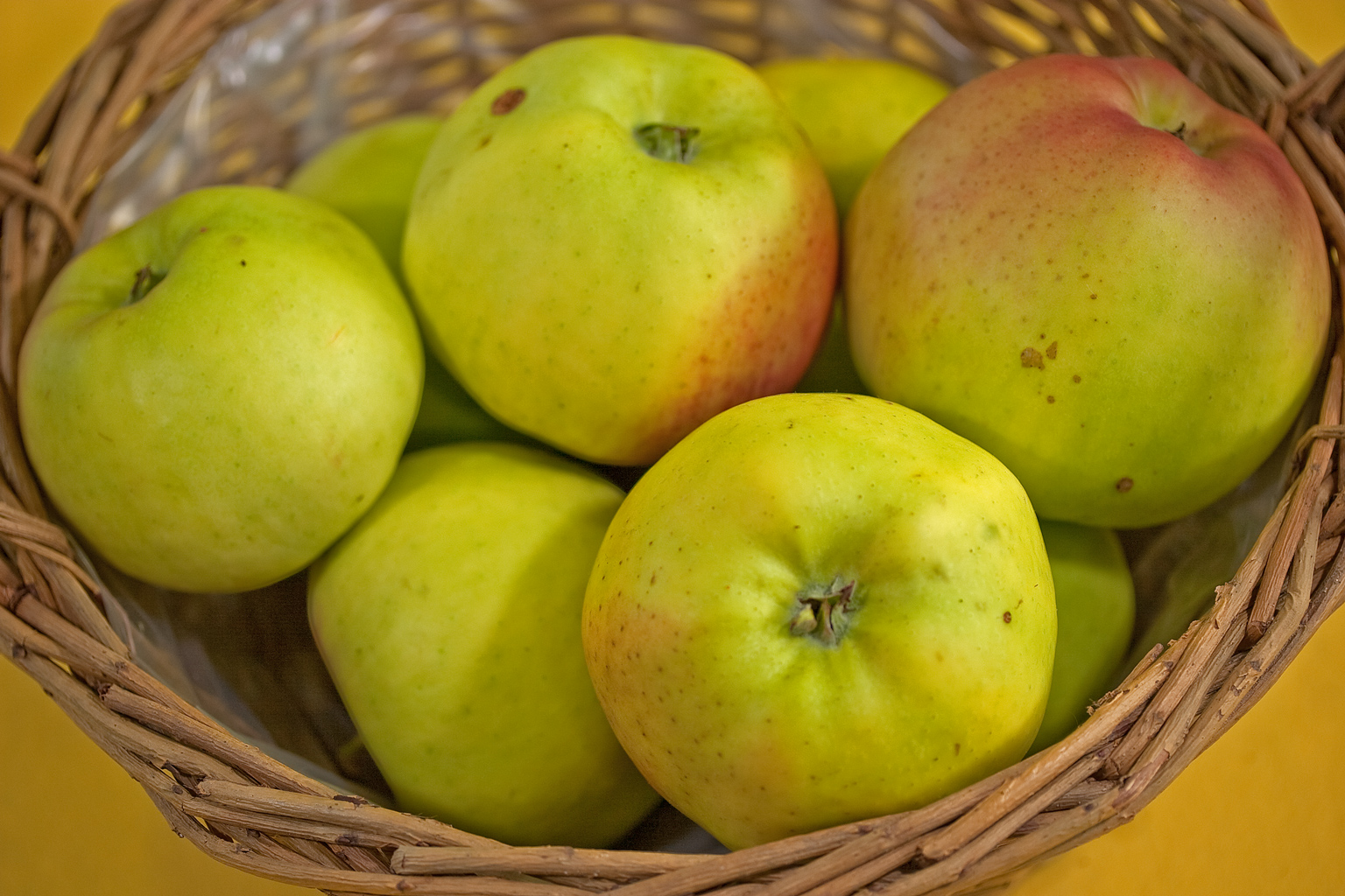 Signe Tillisch ist eine alte Apfelsorte, die ursprünglich aus Jütland stammt.